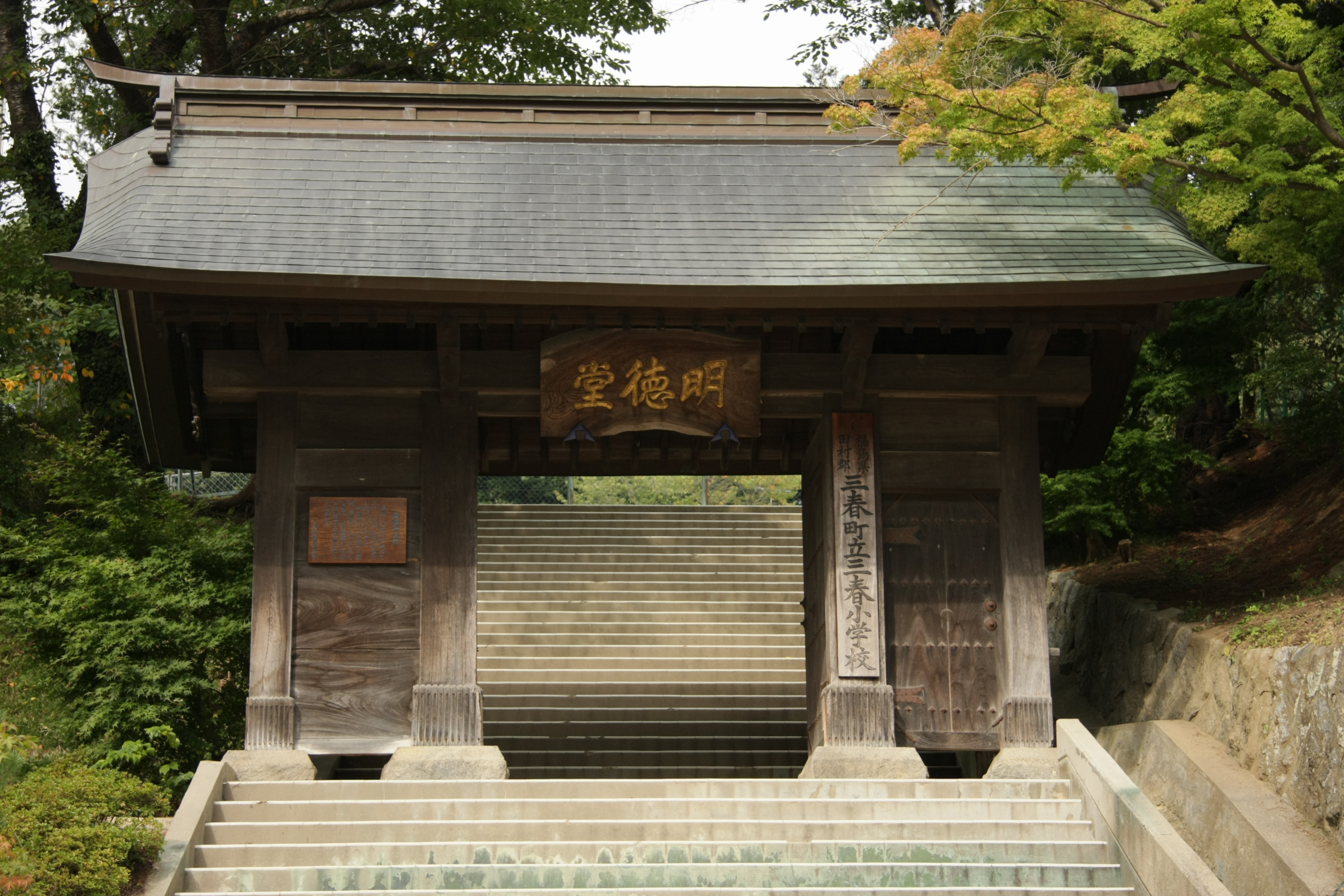 旧藩校明徳堂の表門（現在は三春小学校の校門）